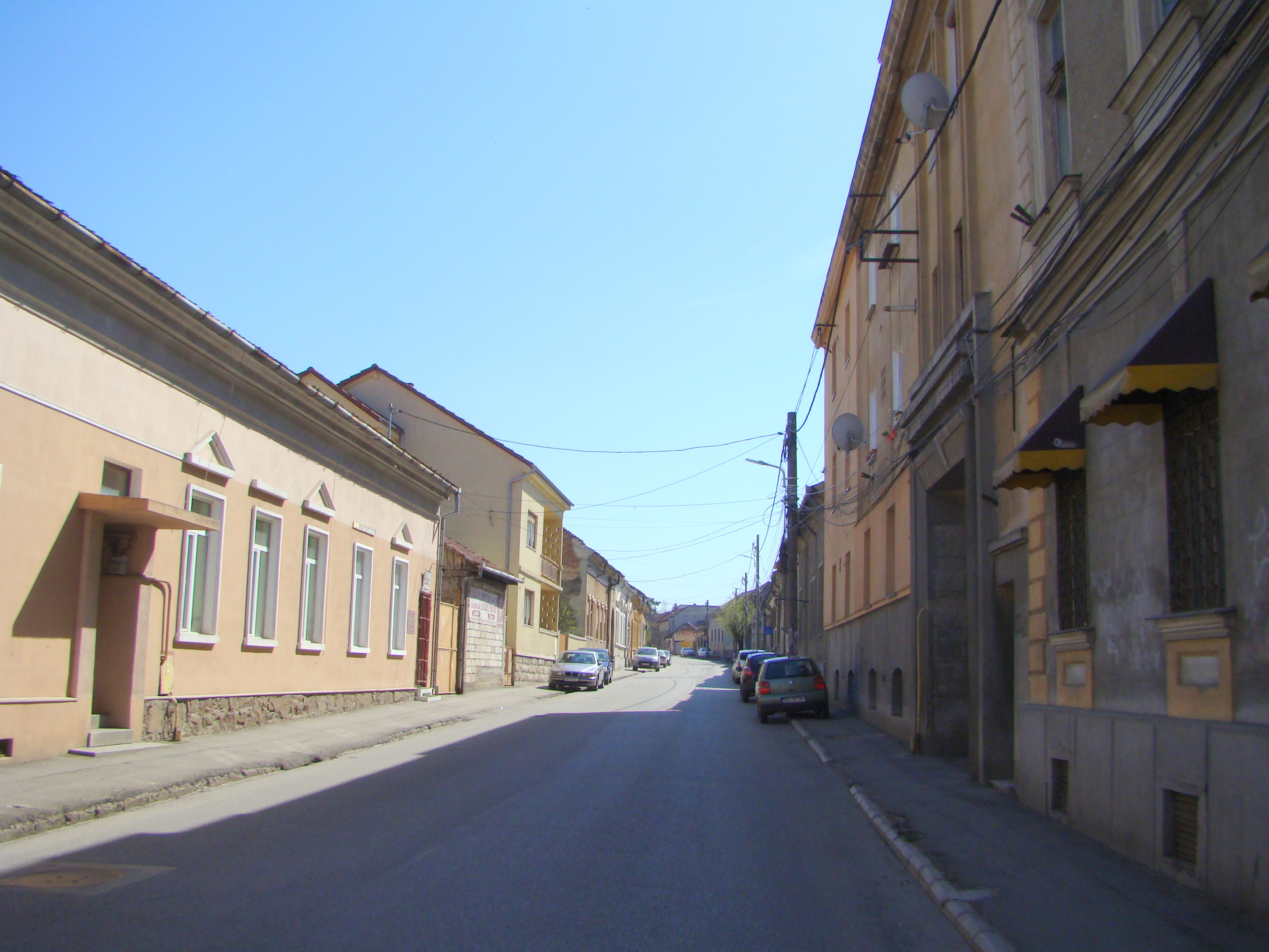 Ansamblul urban „Str. Mihai Eminescu”, municipiul Deva, str. Eminescu Mihai 1, 1 A-13, 17; 2-20, 28-34 05